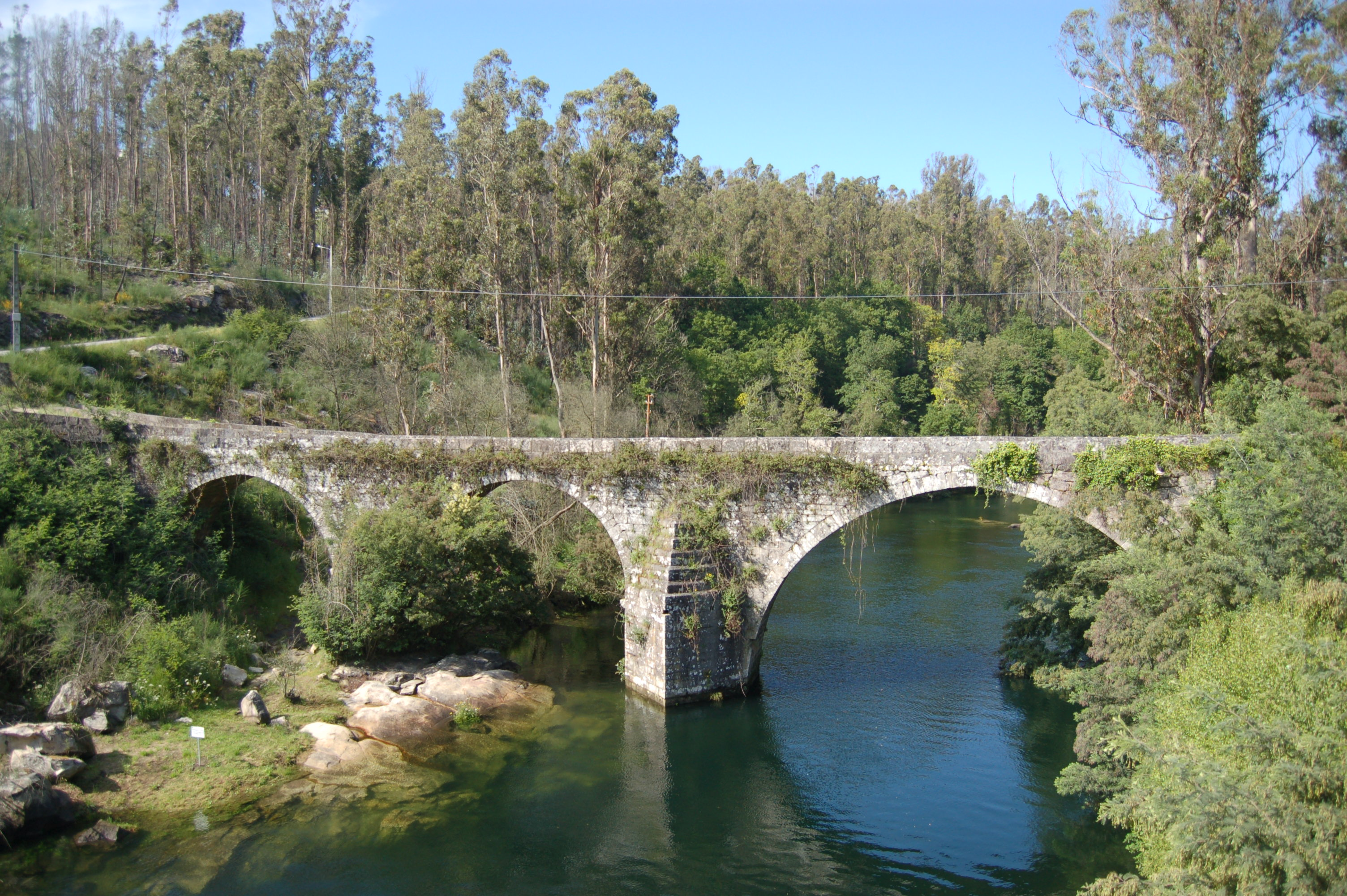 Ponte medieval sobre o río Verdugo en Comboa (Soutomaior)